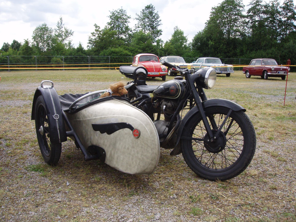 AWO 425 mit Beiwagen